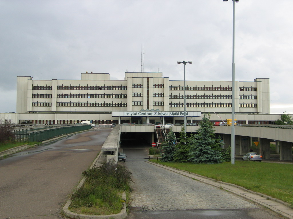 Instytut Centrum Zdrowia Matki Polski w Łodzi